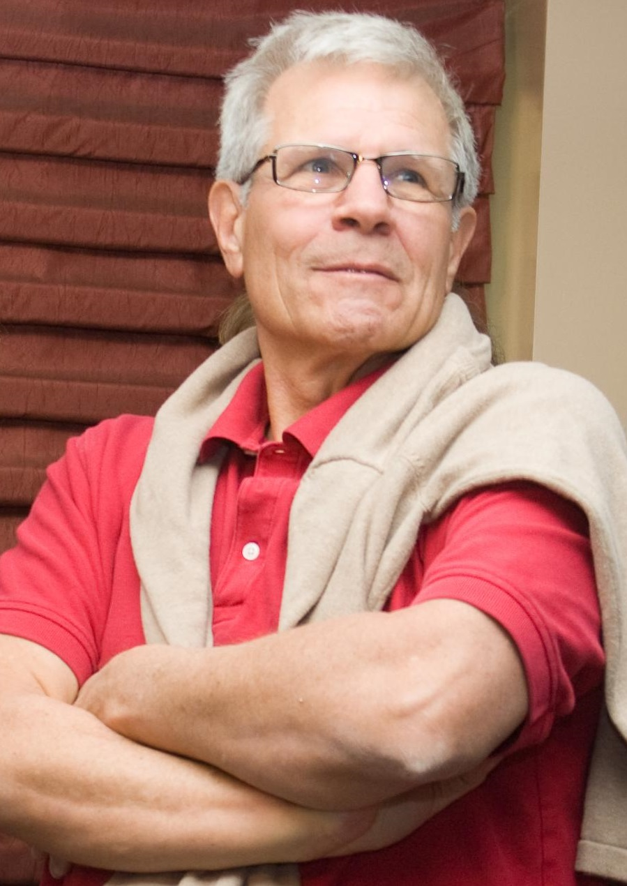 Emiliàn e rumagnòl: Al regìsta ad film ad scarésa Tom Holland